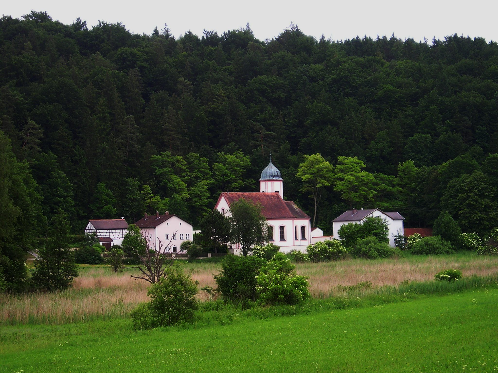 Barocke Wallfahrtskirche Hl. Kreuz in Schambach (Gemeinde Kipfenberg), Landkreis Eichstätt, Oberbayern